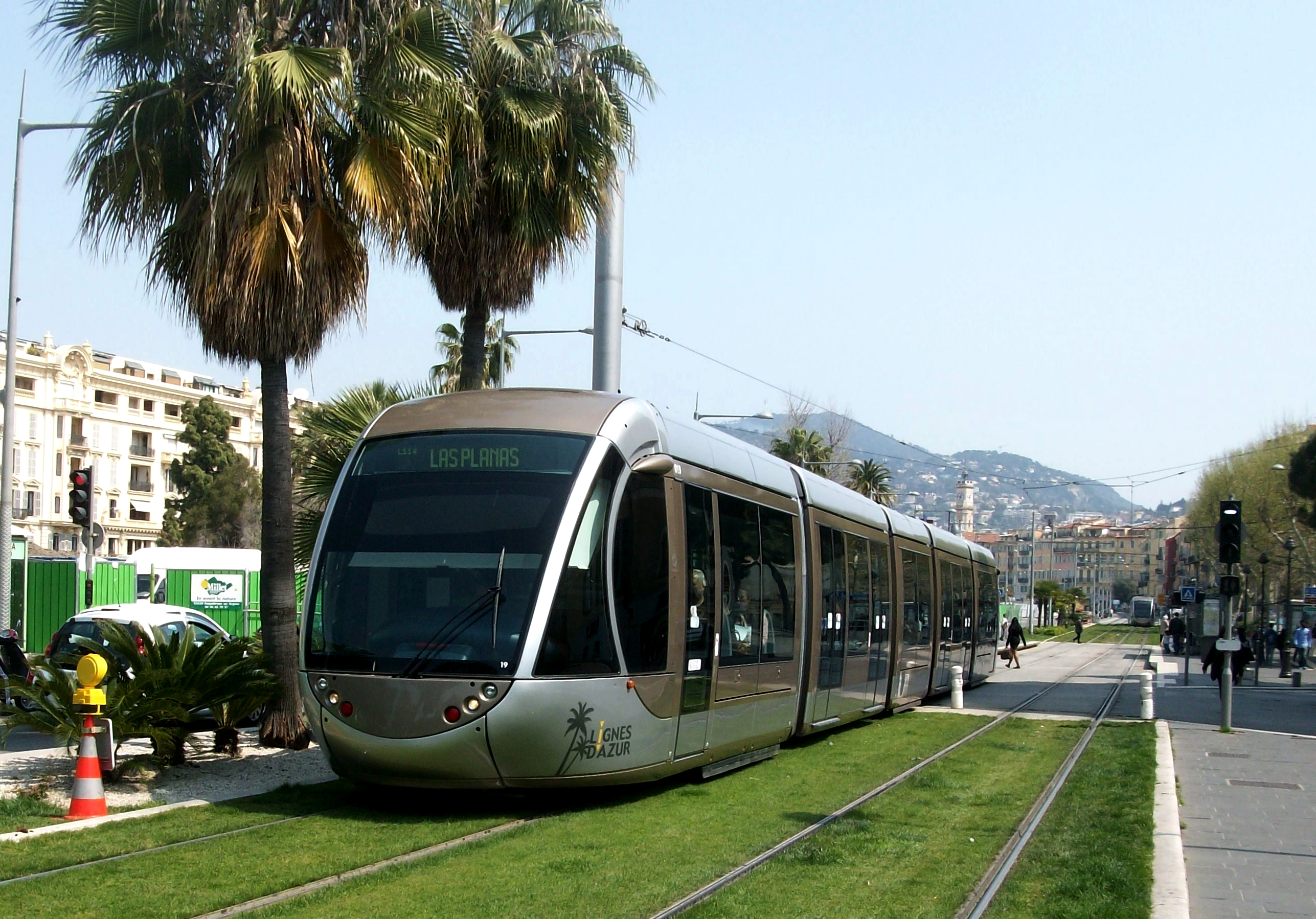 Rame de tramway Alstom Citadis 302 à Nice